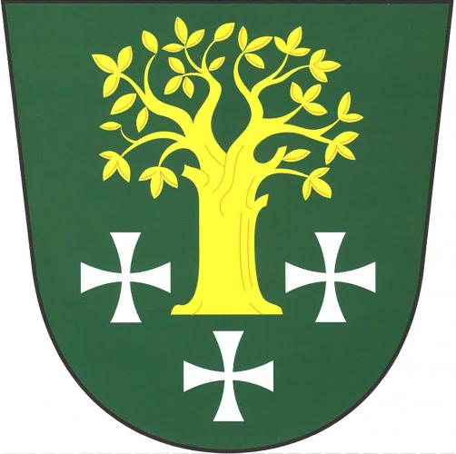 Bukovník znak